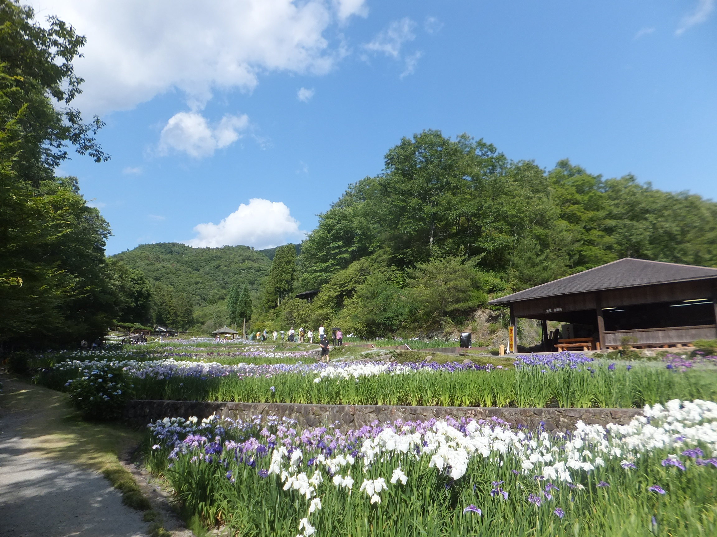 播州山崎花菖蒲園（2013年6月16日）